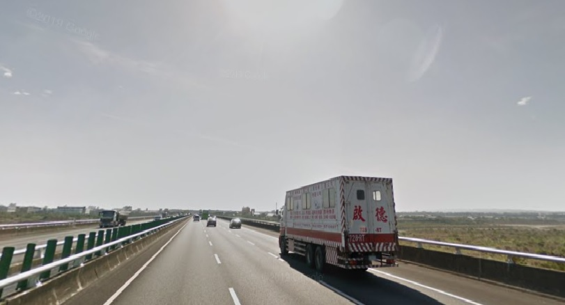 2007年，瑋倫車禍發生地